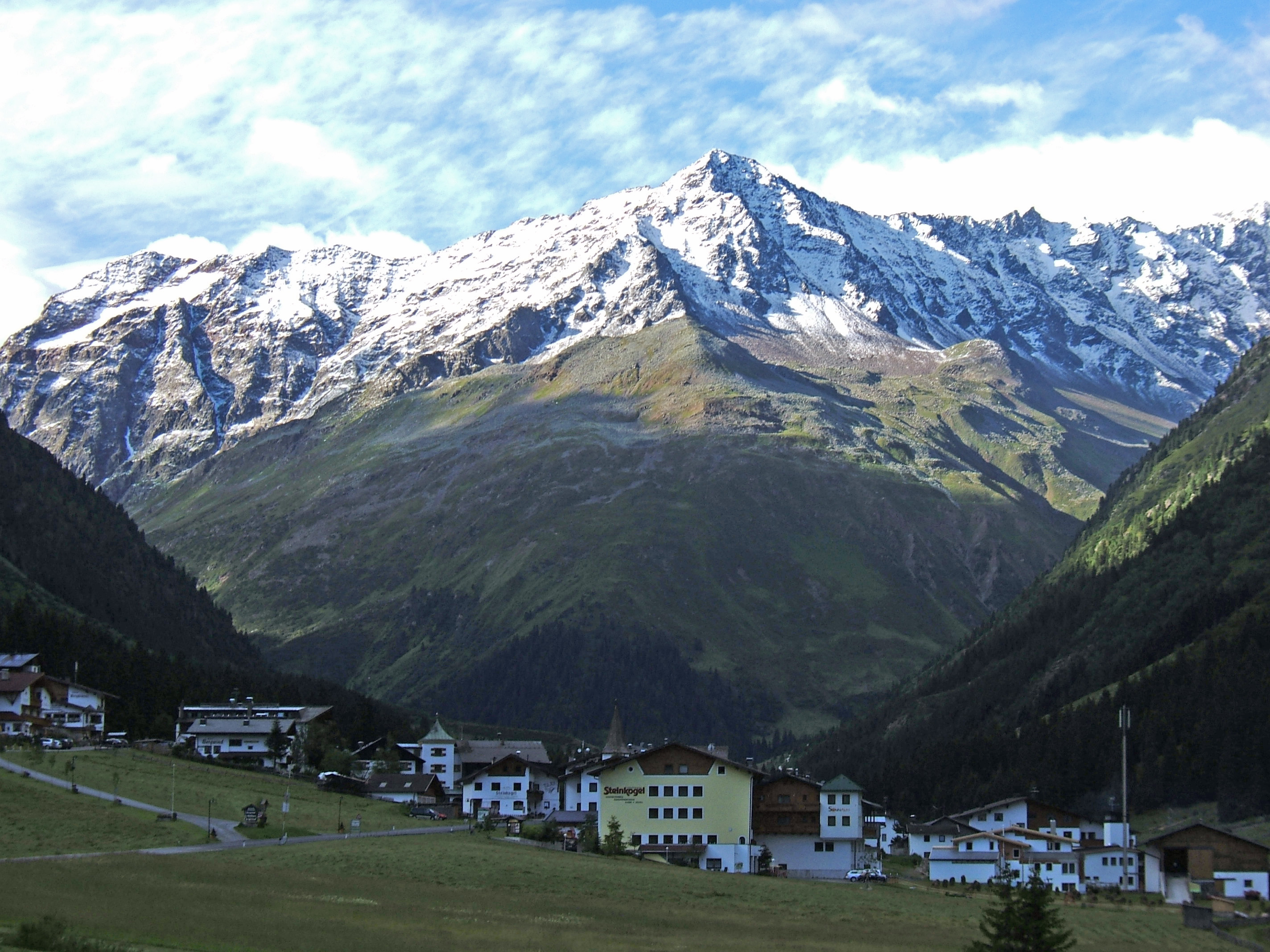 Mittagskogel (Pitztal) from North